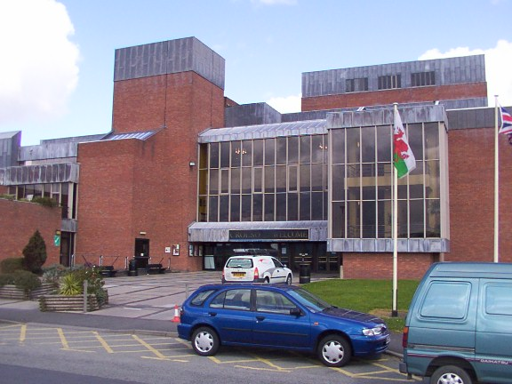 Clwyd Theatr Cymru, Flintshire, Wales.